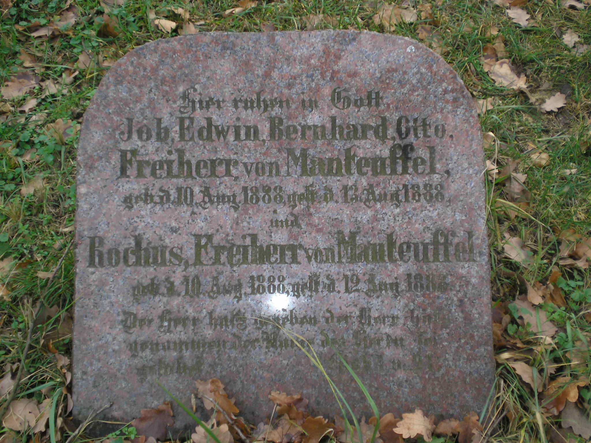 Grobowce rodziny Manteuffel w Toporowie